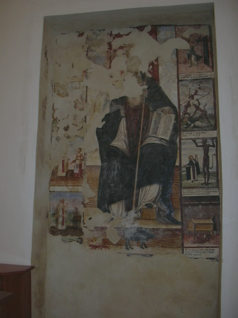 Aidone - EN_Sicilia:Chiesa di Sant'Antonio Abbate, affresco che illustra la vita e le tentazioni del santo.